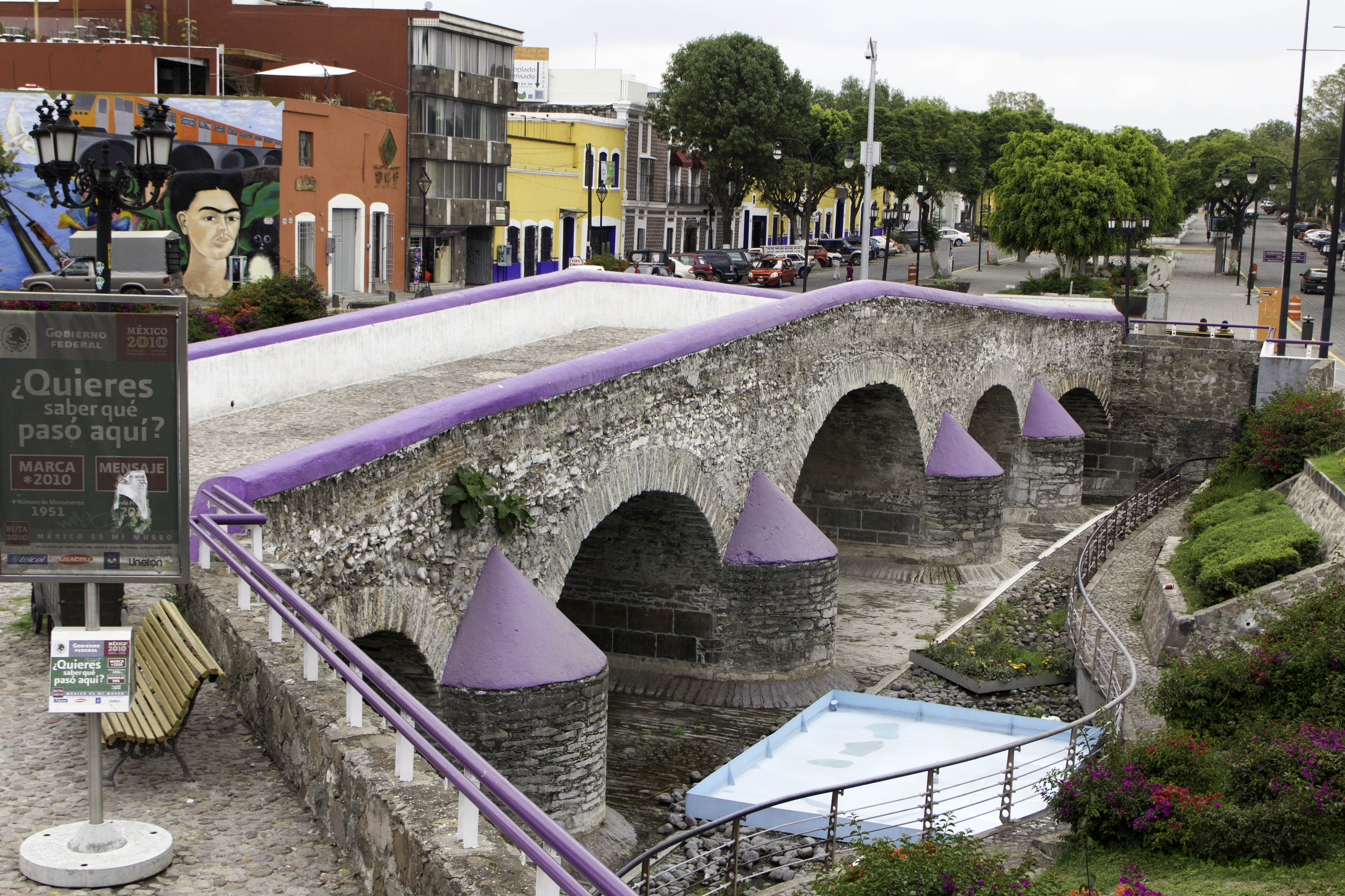 Antiguo Puente de Ovando en el Barrio de Analco, Puebla